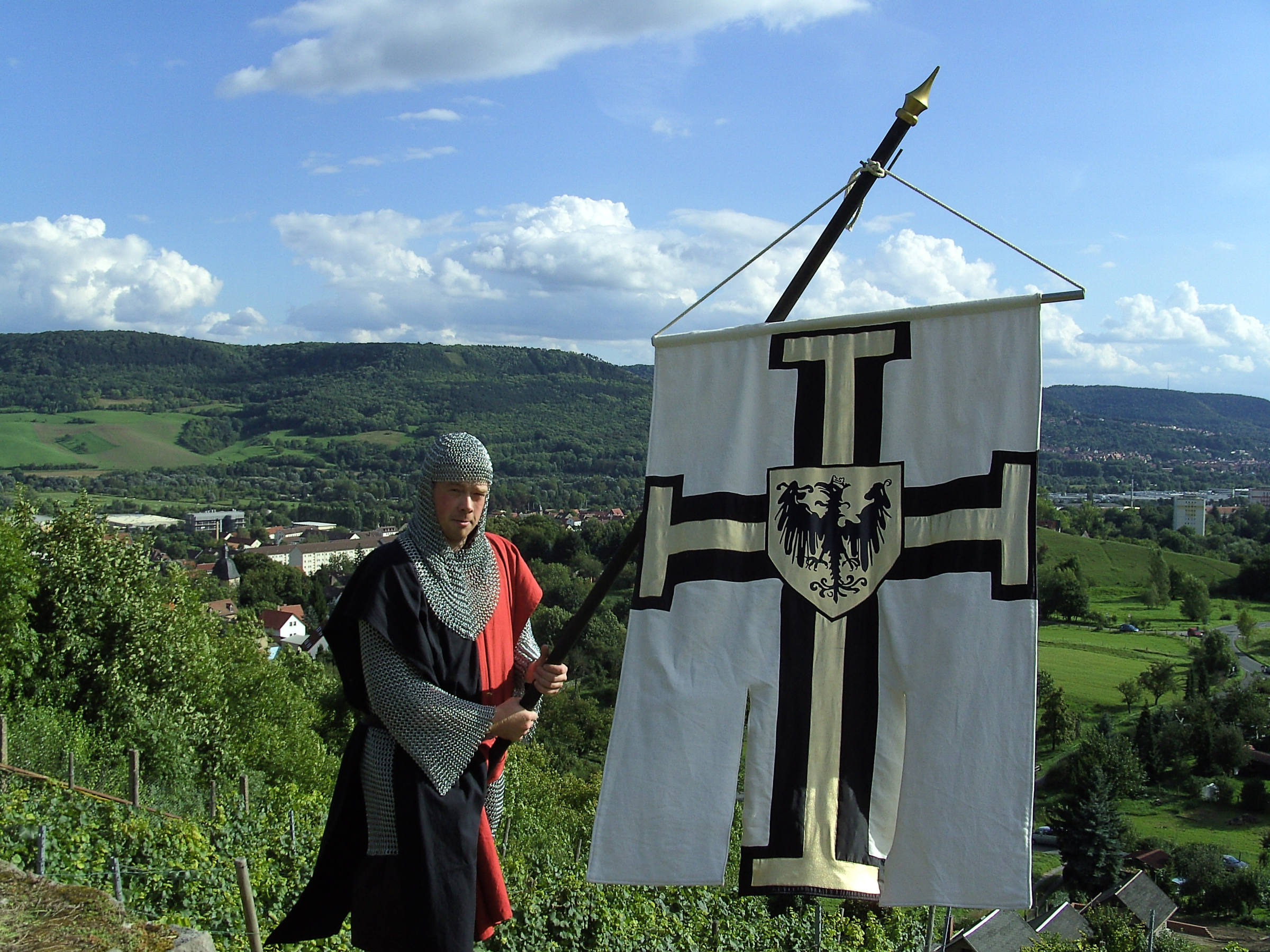 Weinbergfest